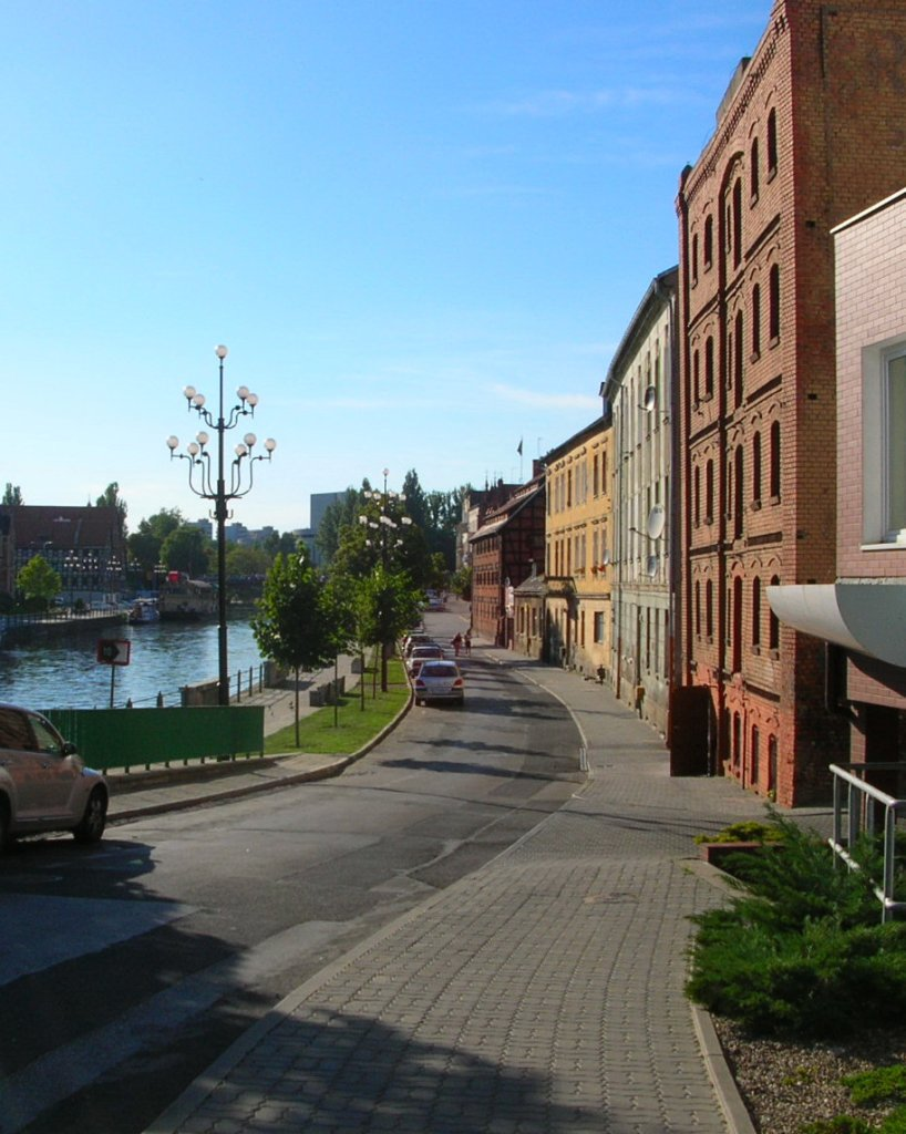 Ulica Stary Port w Bydgoszczy